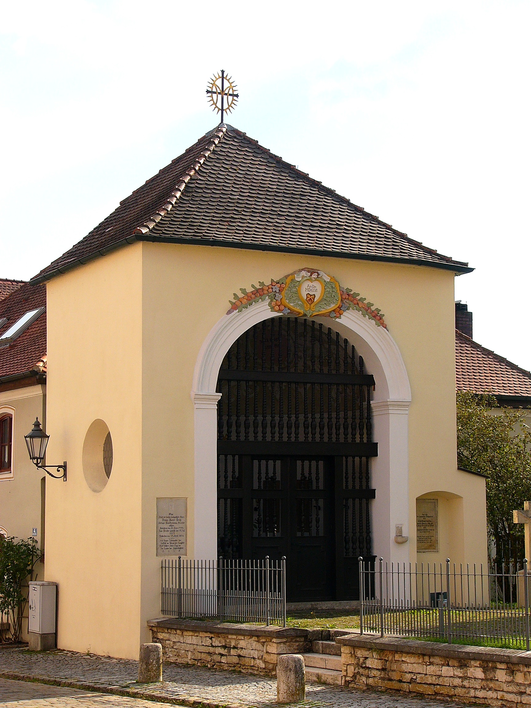 Ölbergkapelle; giebelständiger Flachsatteldachbau mit Treppengiebel und Nischenarchitektur, 19. Jahrhundert mit Ölberggruppe erste Hälfte 16. Jahrhundert.This is a photograph of an architectural monument.